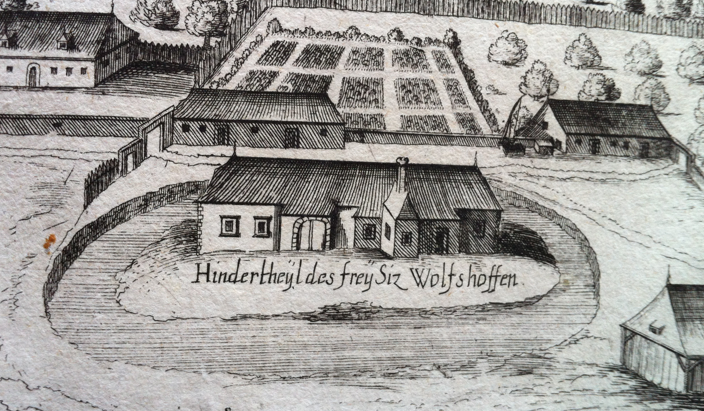 Der Freisitz Wolfshof in der Topographia Windhagiana Aucta, Wien 1673.